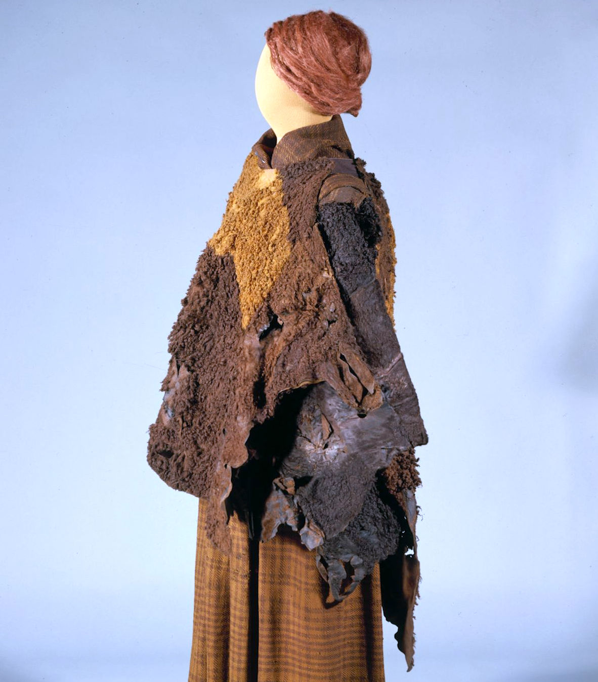 Kvindedragt fra Huldremosekvinden bestående af 2 skindslag + halsklæde og skørt af uld. Fra Huldremose, Ørum sogn. Fra nyopstilling, 1980